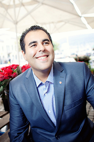 Masud Gharahkhani